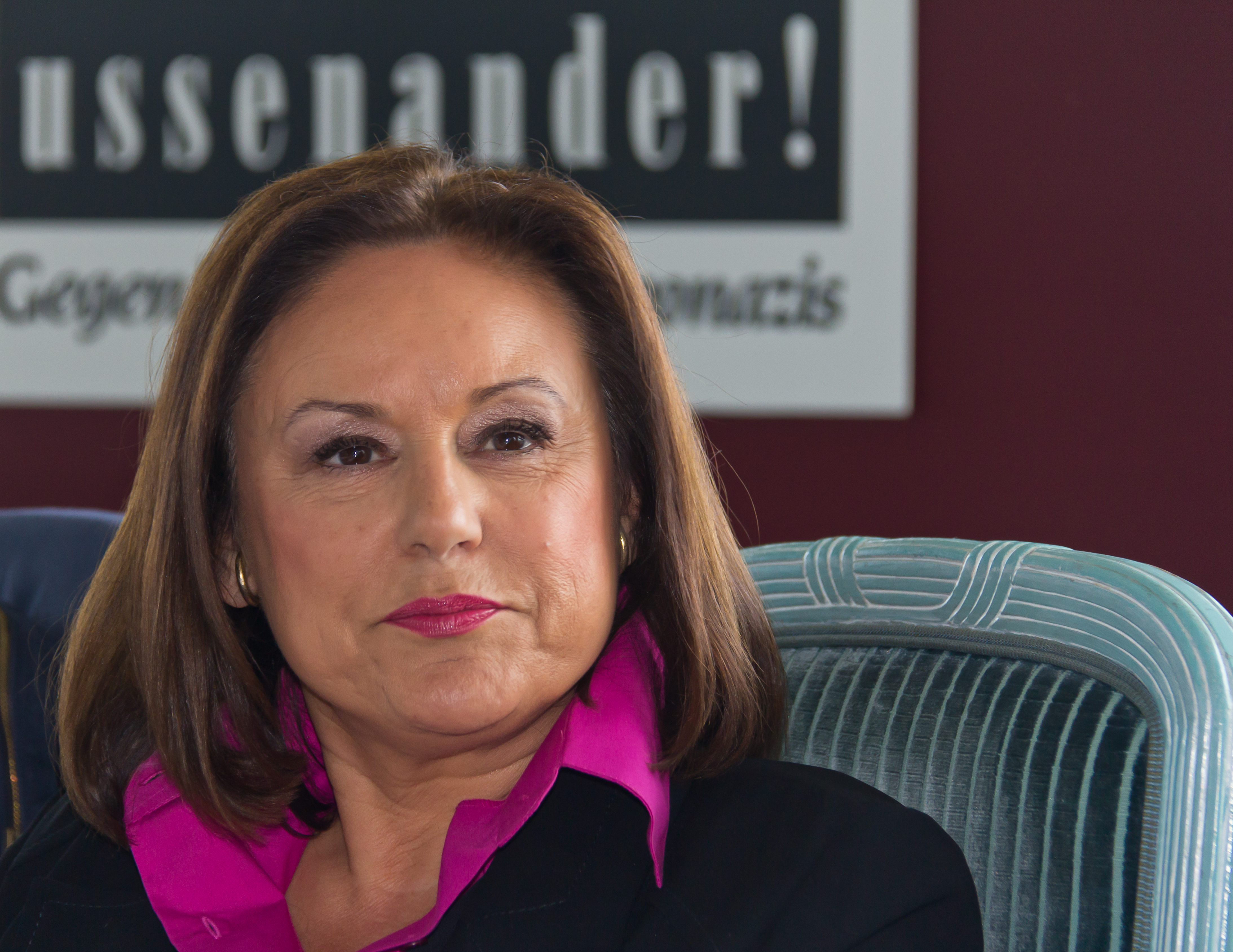 Pressekonferenz zur Kundgebung 20 Jahre „Arsch huh, Zäng ussenander“ im Kölner Hotel Maritim, Dachgartenrestaurant Bellevue Foto: Monika Piel (Schirmherrin der Kundgebung, Intendantin des WDR und Vorsitzende der ARD)